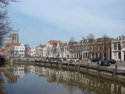 Nedersaksies: Goedereede-anzicht.jpg Zicht op Goedereede Haven